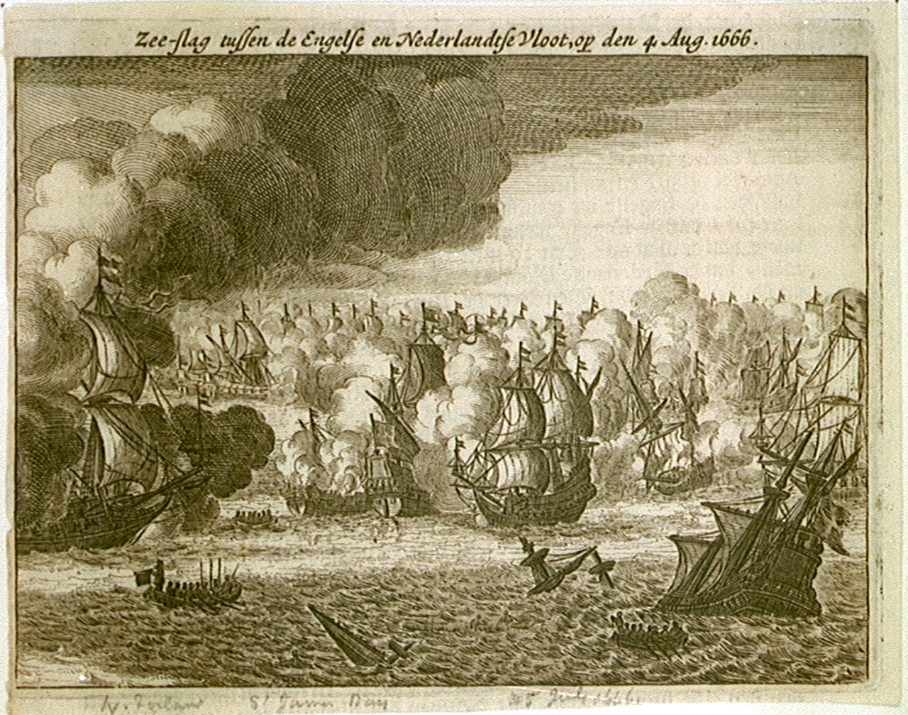 "Zee-Slag tussen de Engelse en Nederlandtse Vloot, op den 4. Aug. 1666"; Engraving showing the St. James Day Fight August 4th, 1666 between English and Dutch Ships